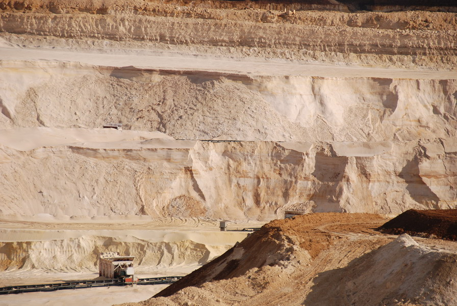 Front de taille dans une carrière de sable de la région de Fontainebleau